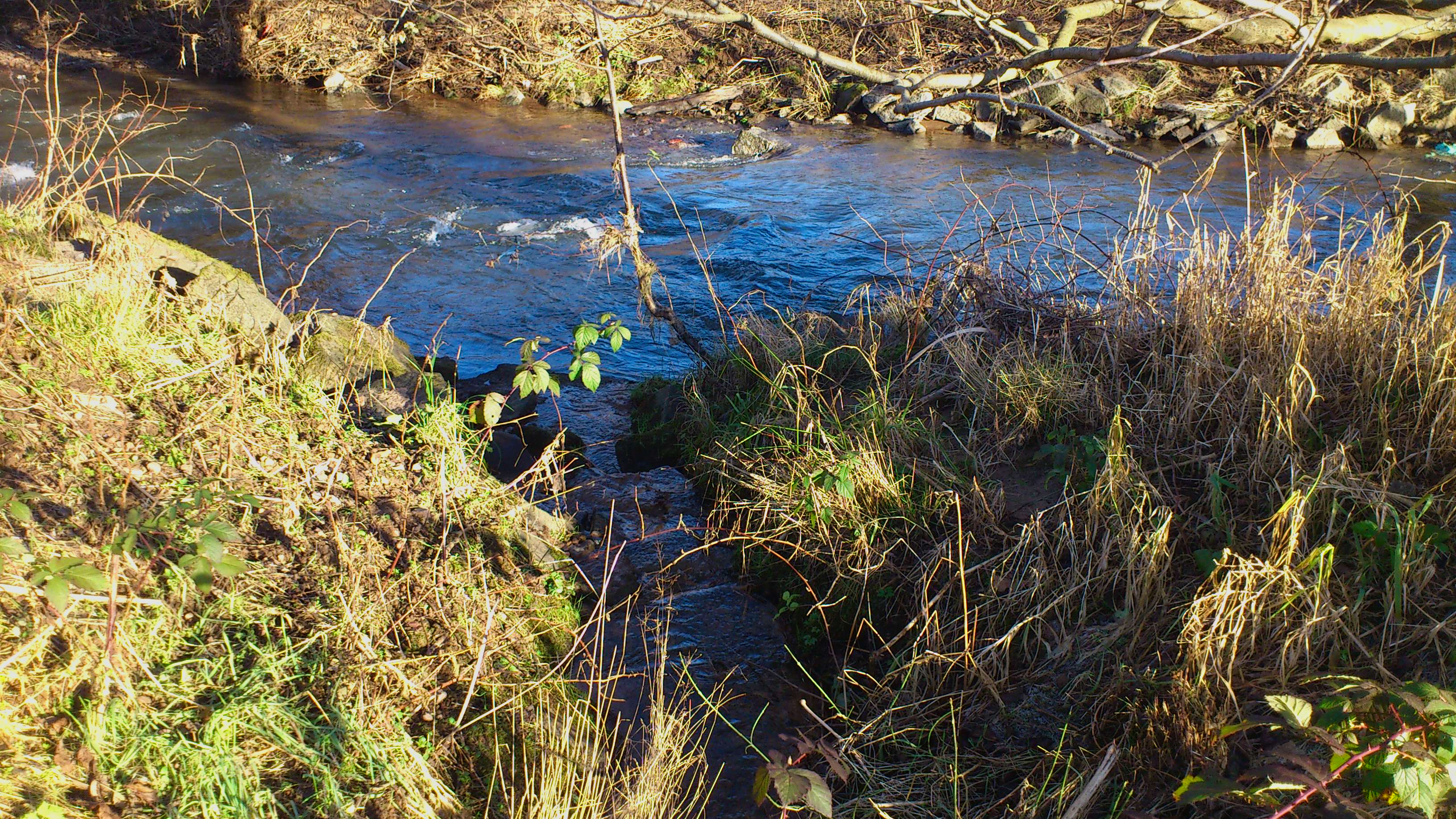 Der Wüstenbach mündet in die Kahl